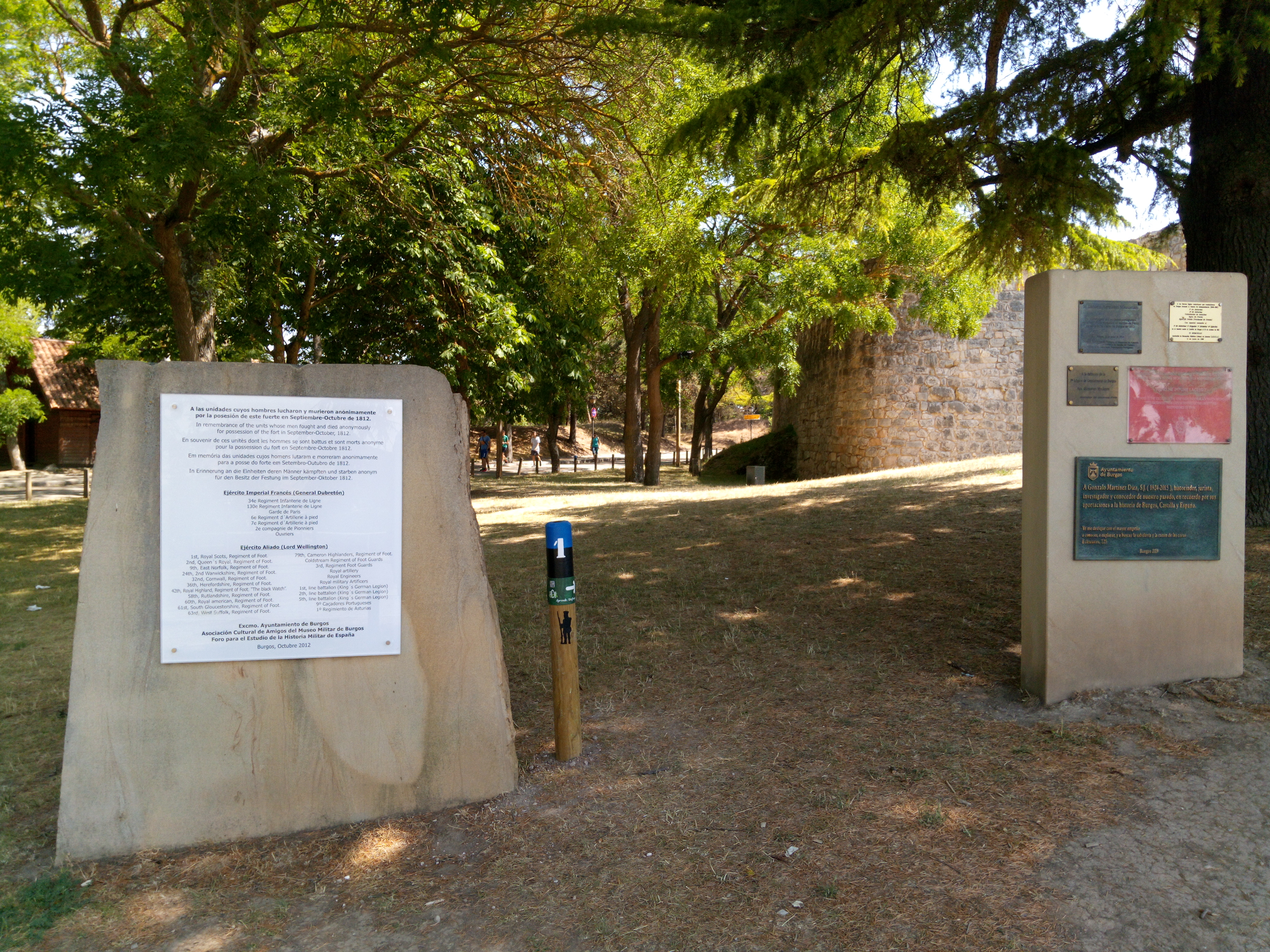 Representa a los soldados que participaron en el asedio al Castillo de Burgos de 1812, durante las Guerras Napoleónicas.